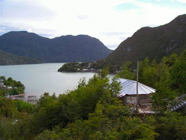 Entrada localidad de Caleta Tortel, Comuna de Tortel, Region de Aysen. Chile